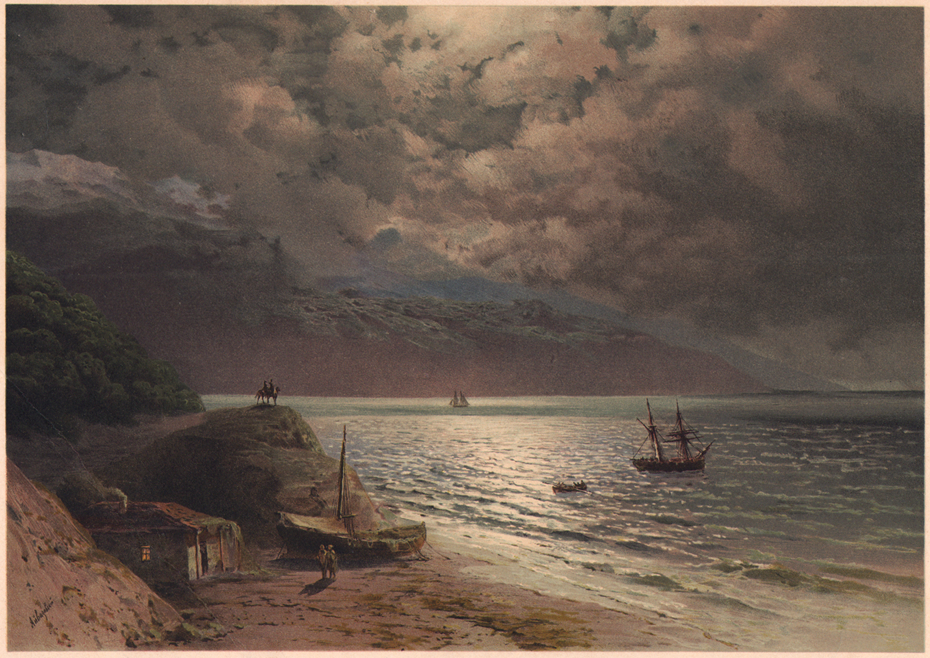 Хромолитография "Лунная ночь на берегу Черного моря" сделана с незначительной корректировкой композиции по пейзажу художника "Ночь в Гурзуфе" (1891 г., холст, масло, 61 Х 81,3 см